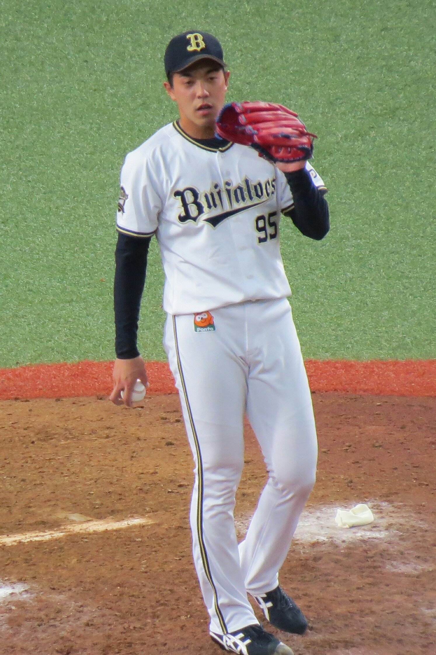 神戸文也